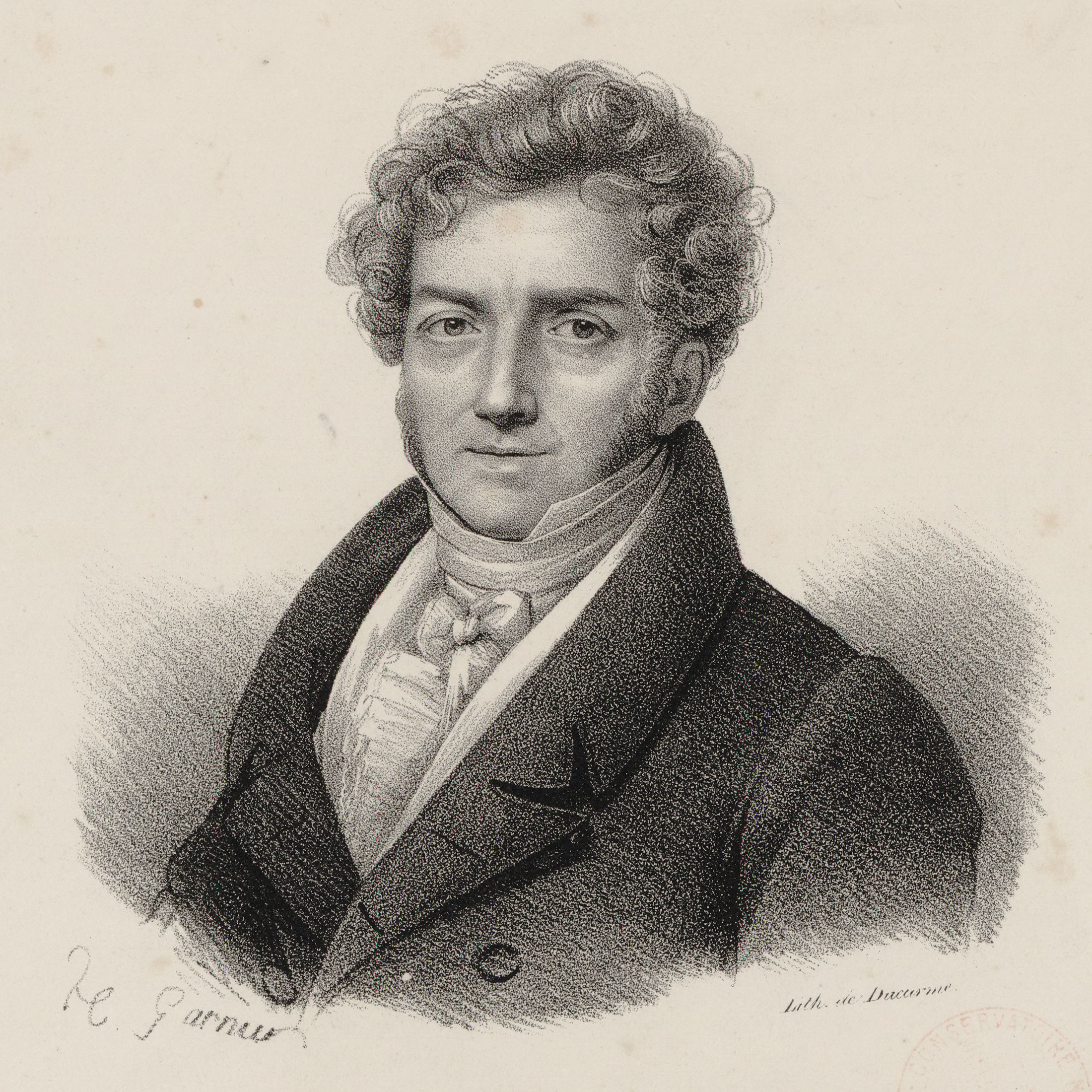 François-Adrien Boieldieu (1775-1834), French composer